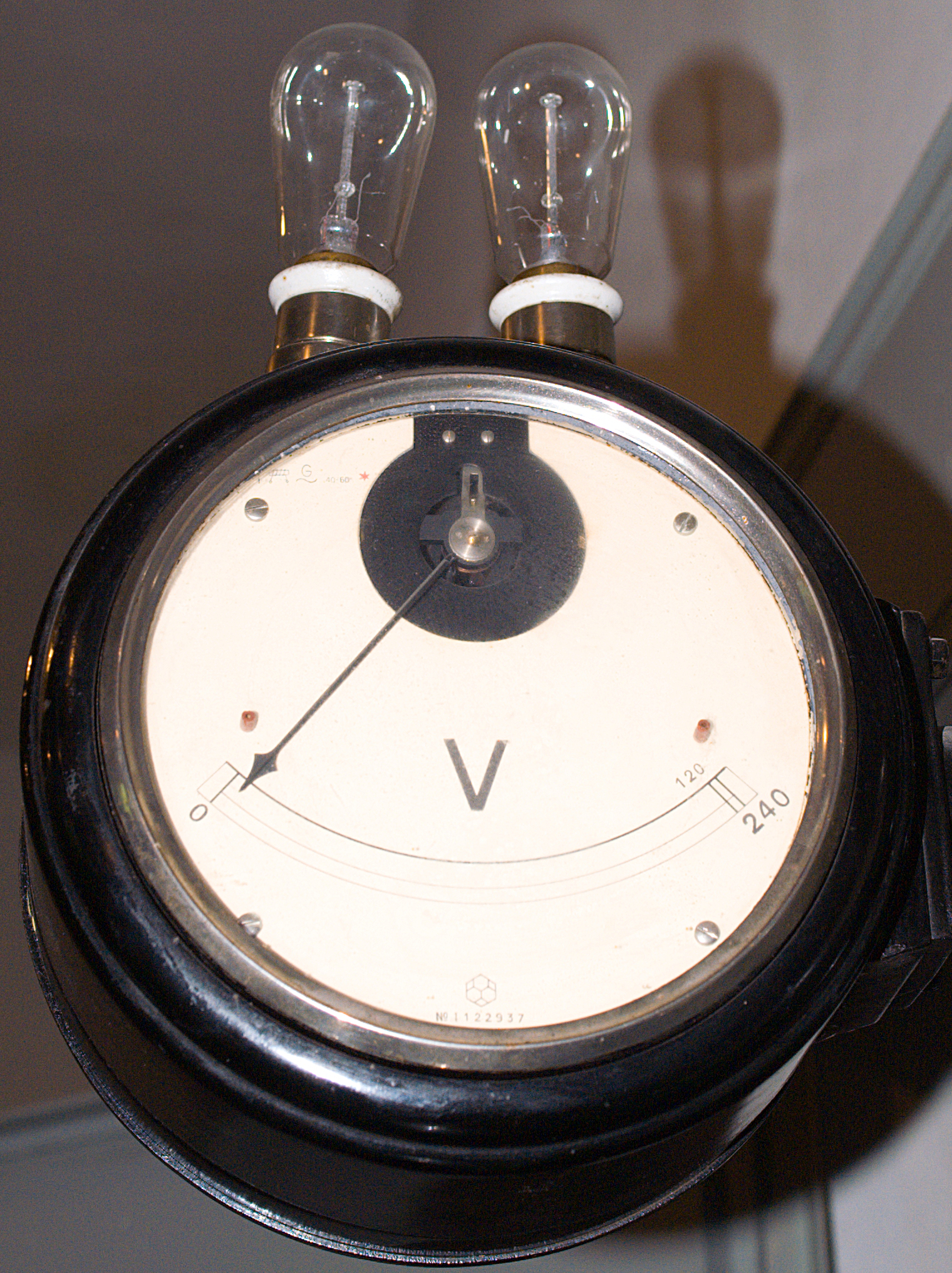 Elktrownia wodna Struga.